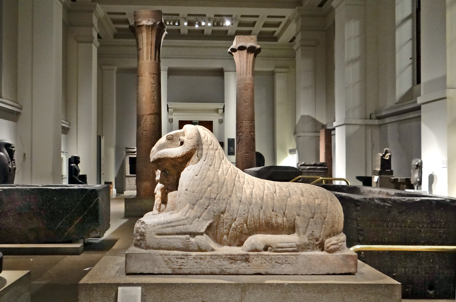 Au premier plan, statue en granite du Dieu Amon sous la forme d'un bélier protecteur du Roi Taharqa qui est représenté entre ses pattes avant. 25e dynastie, (Troisième période intermédiaire, nubienne) 690-664 avant notre ère Temple T at Kawa, Soudan Salle de la sculpture égyptienne (British Museum) C'est dans cette salle que se trouve la pierre de Rosette